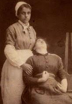 La supuesta niña Marín